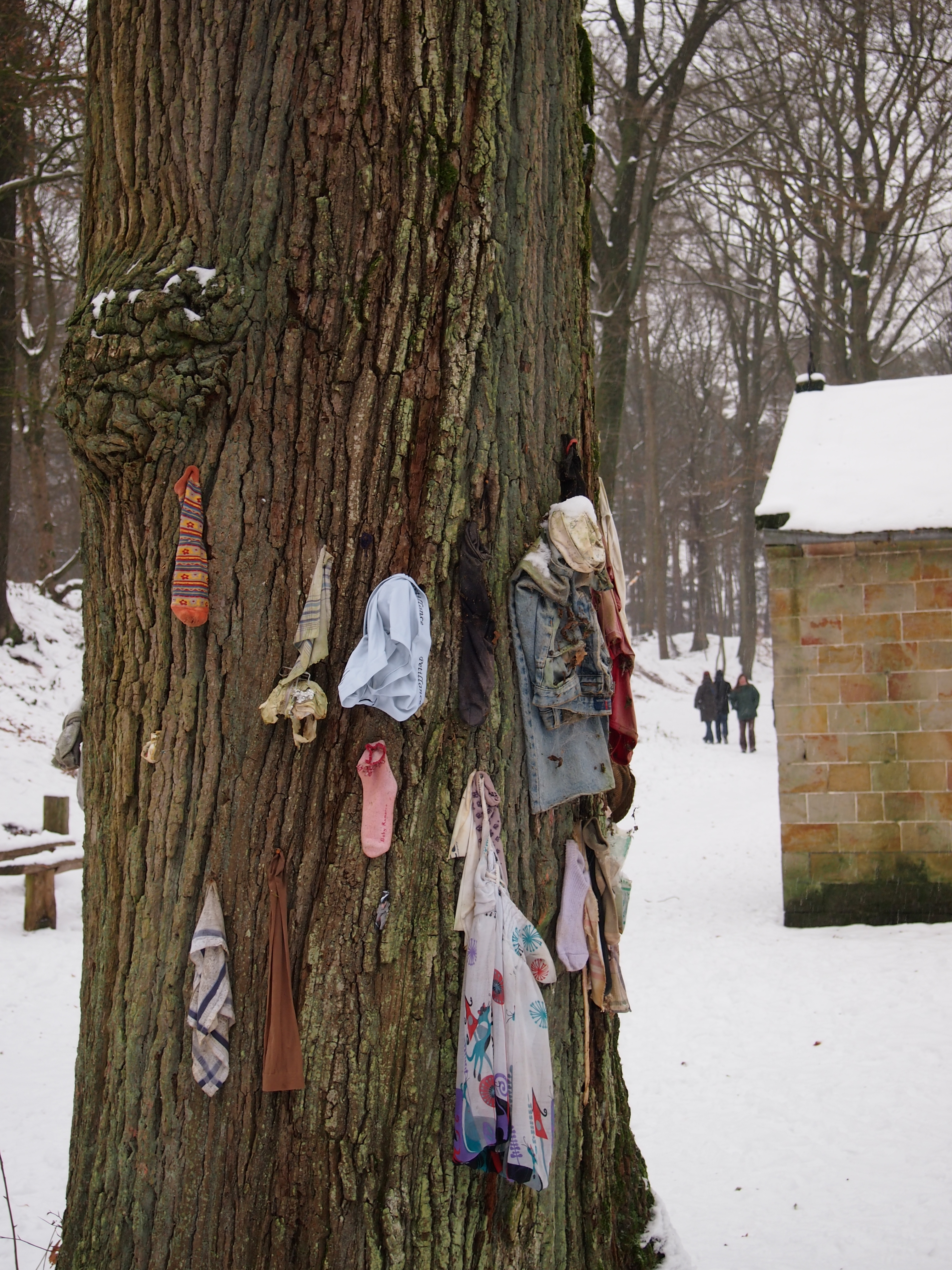 Arbre à clous de Stambruges (Hainaut, Belgium), chêne (janvier 2013)